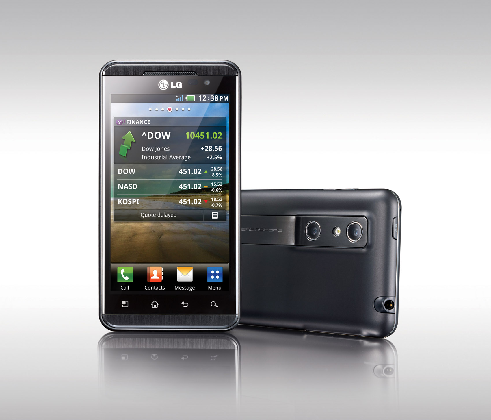 LG '옵티머스 3D' 제품 사진 및 3D 증강현실 컨셉 사진